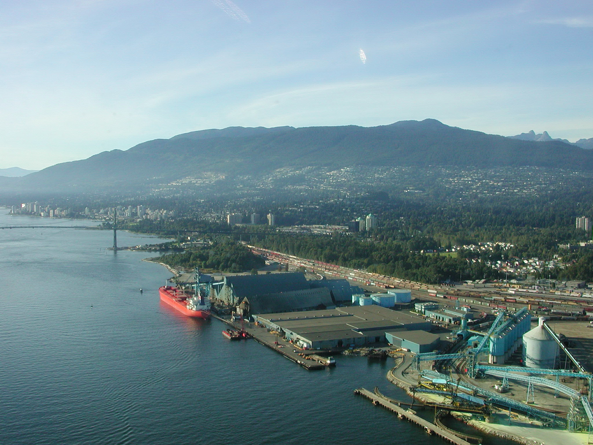 Vancouver Harbour 溫哥華港